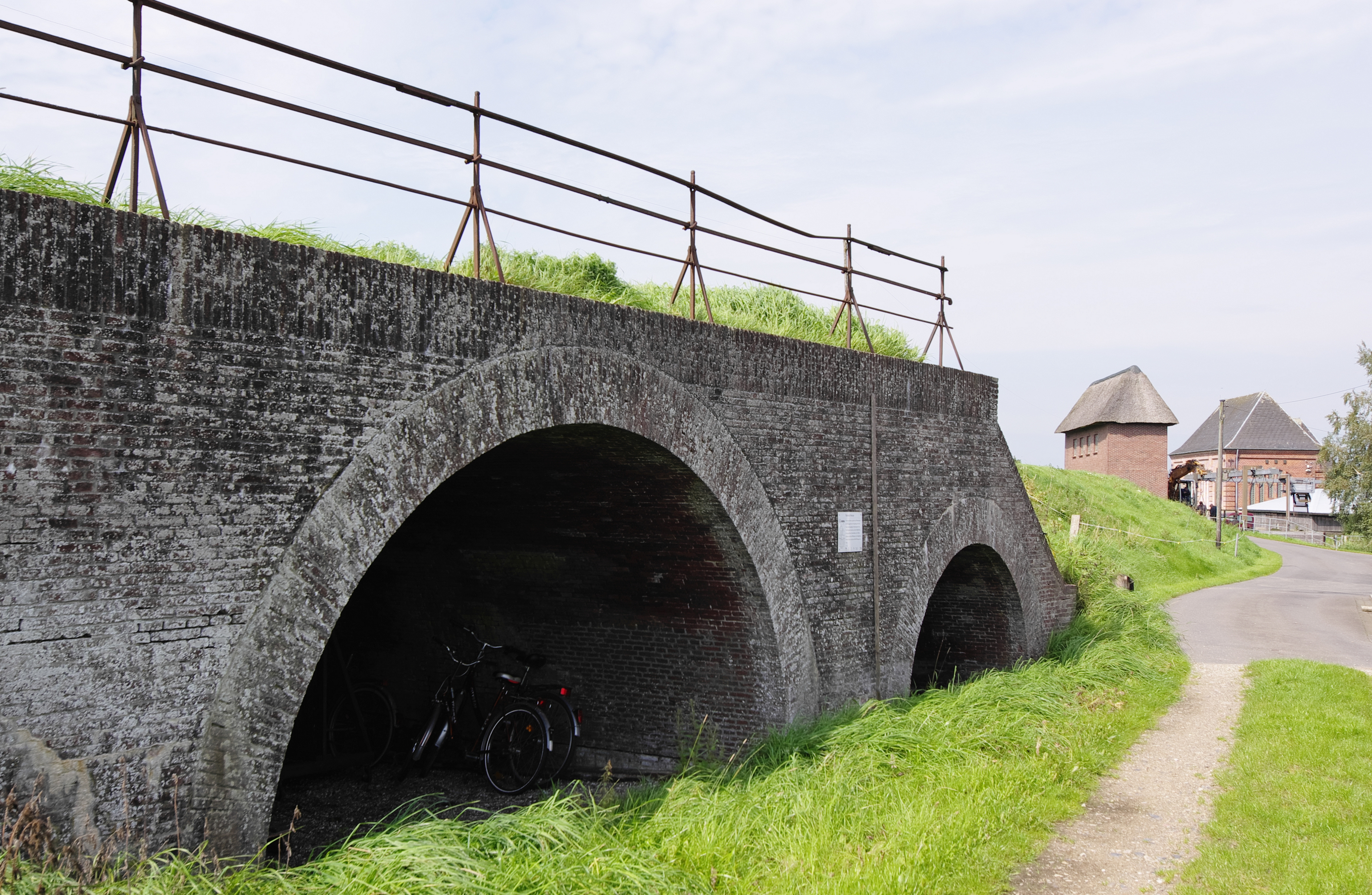 Steinschleuse Süderstapel an der Eider, Verlandete Schleuse des alten Schlots, landseitig